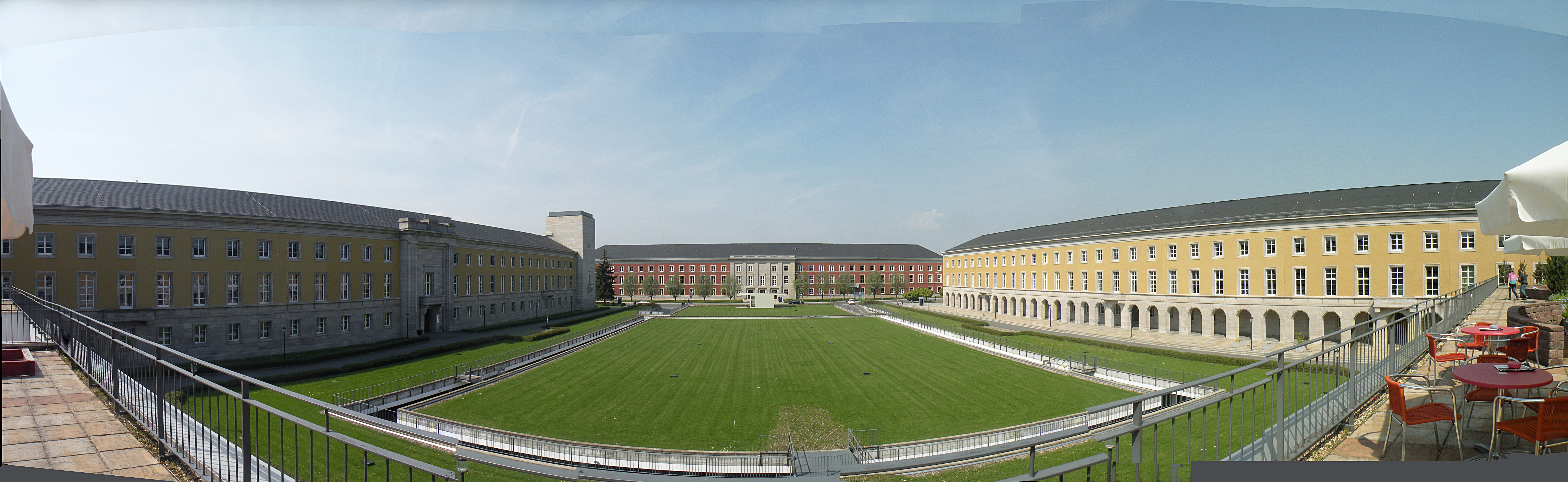 Атриум. Внутренний двор.